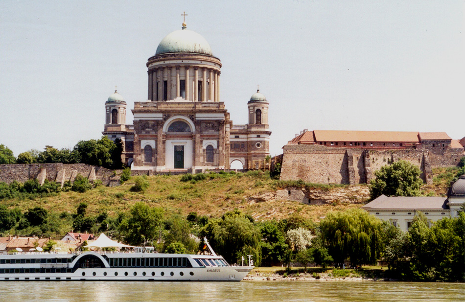 Flusskreuzfahrtschiff Amadeus vor der Kathedrale von Esztergom.